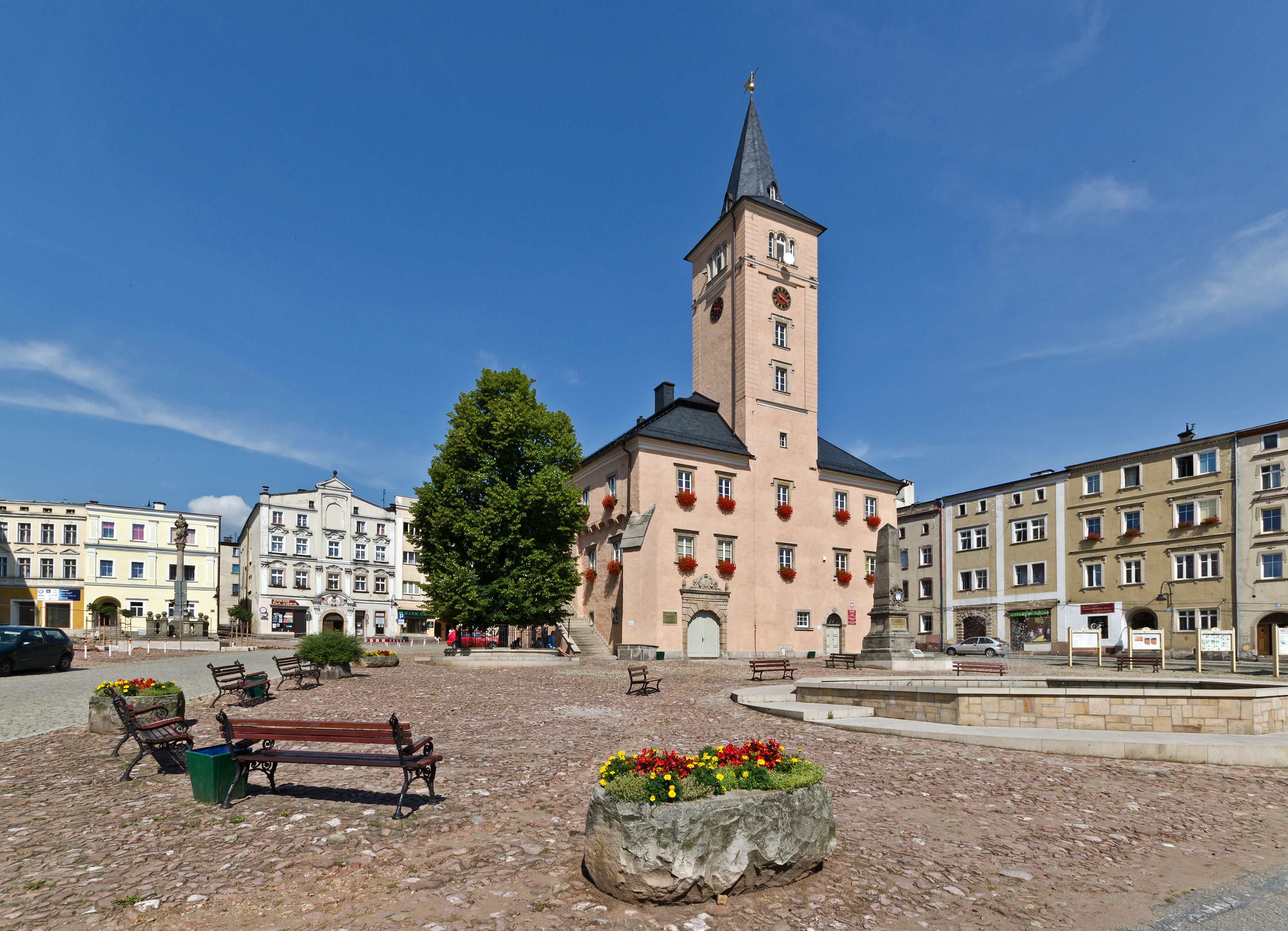 Radków, miasto